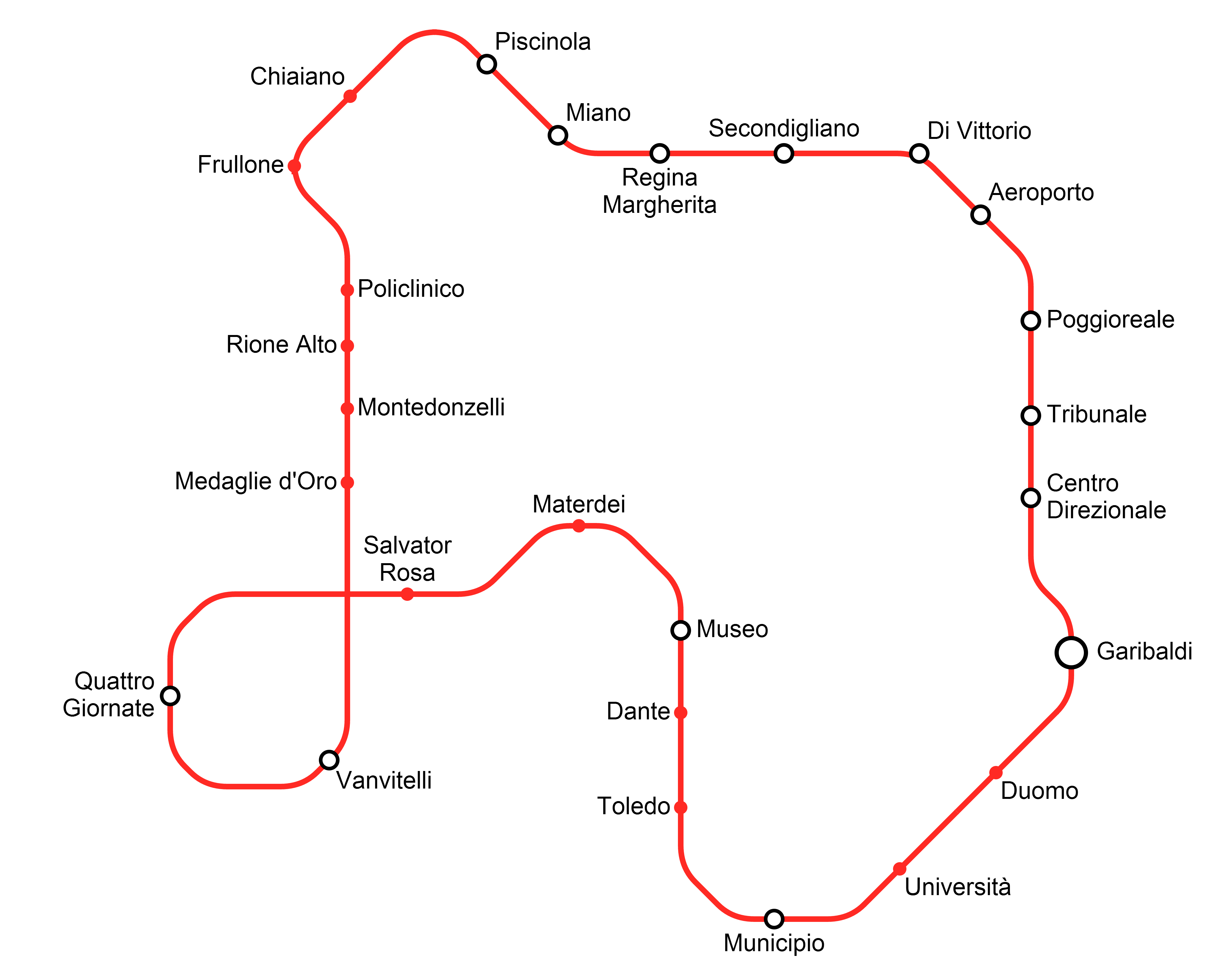 Mappa della linea 1 della metropolitana di Napoli nel futuro.